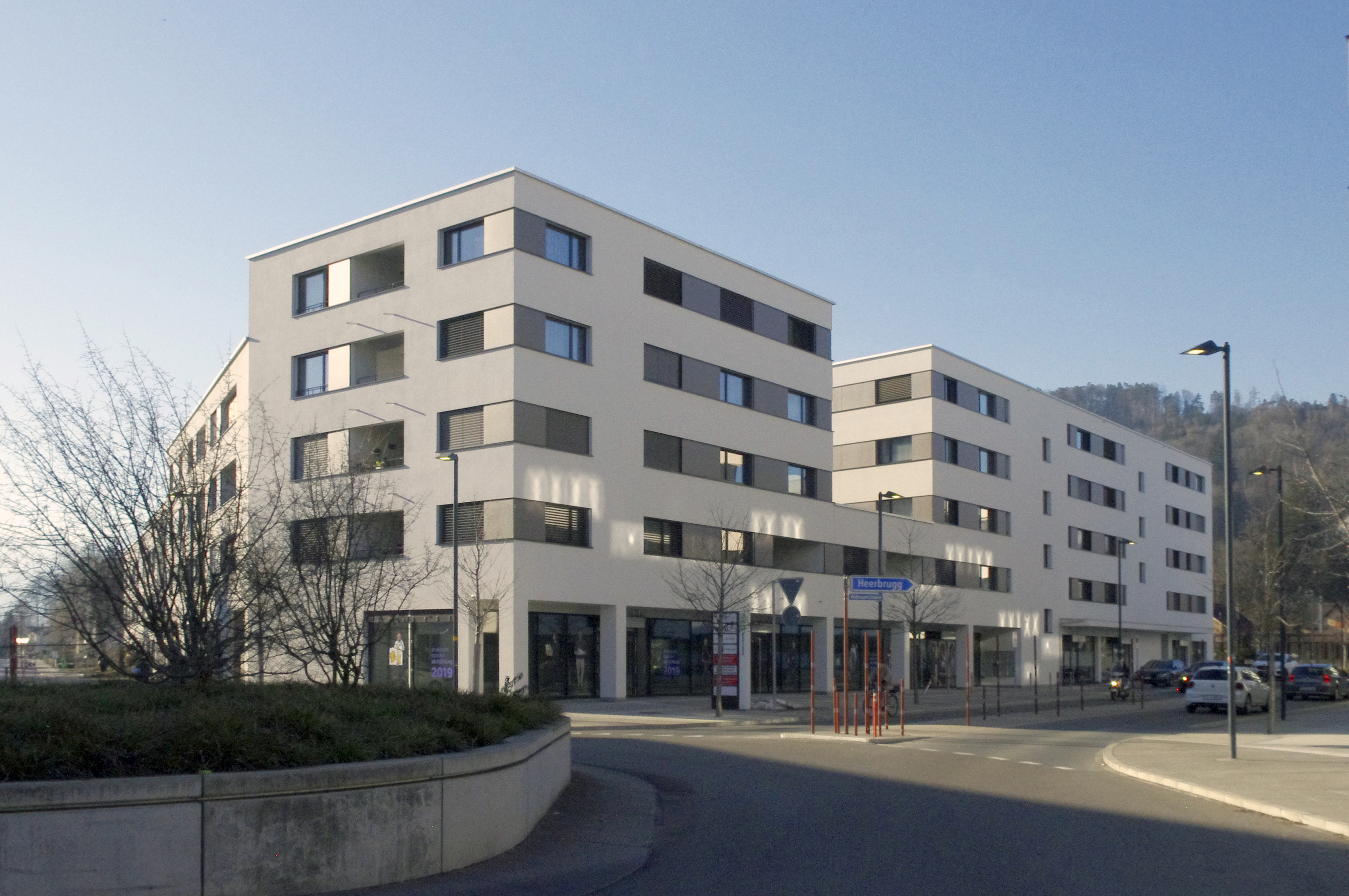 rhenusana Geschäftsstelle Balgach